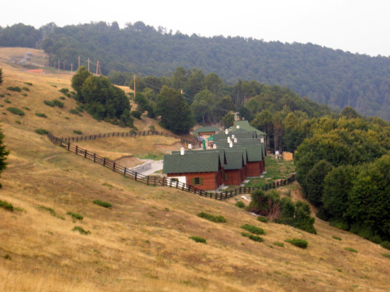 Eko-katuni na Komovima, Crna Gora